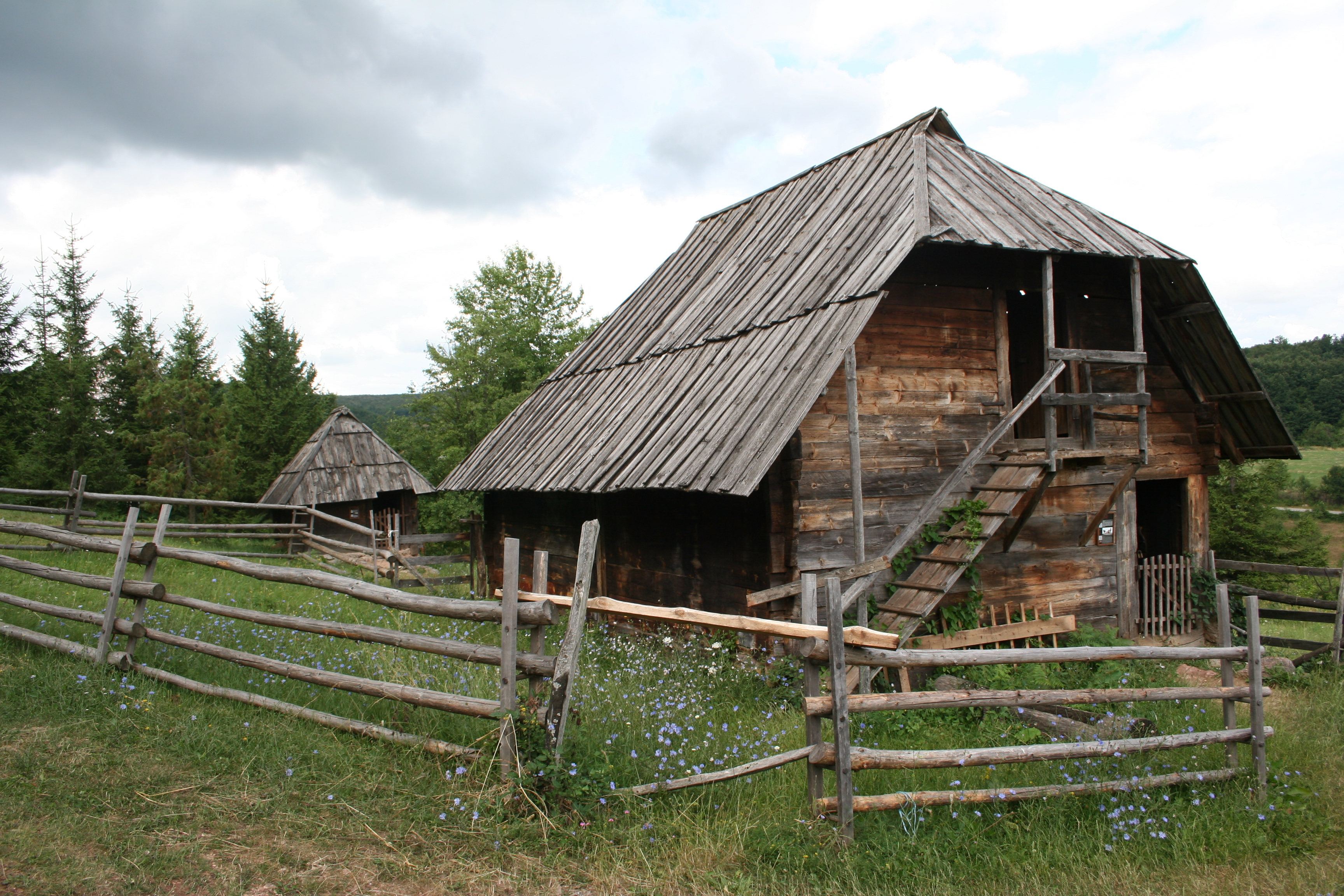 Muzej "Staro selo" Sirogojno